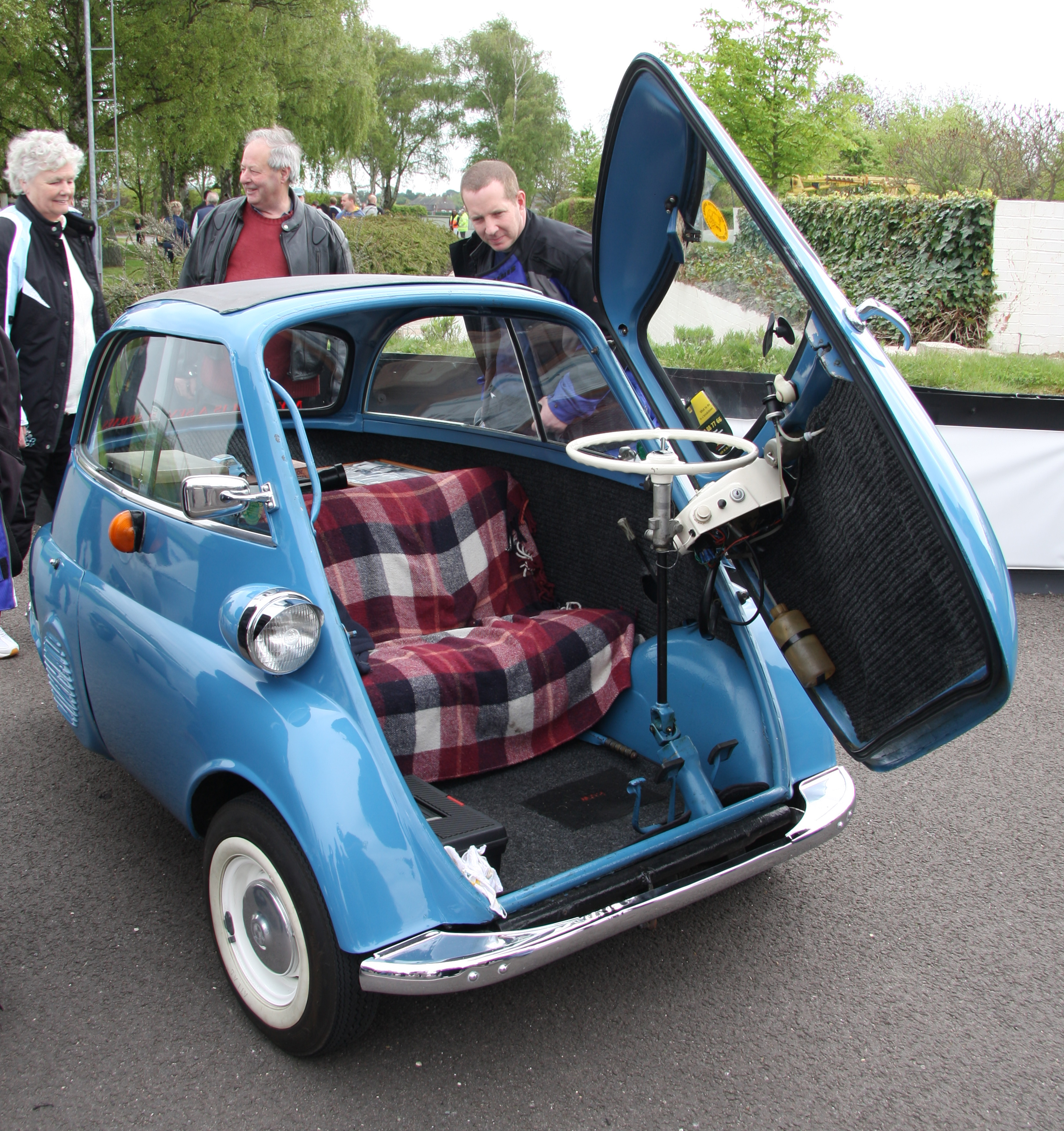 BMW Isetta bubble car